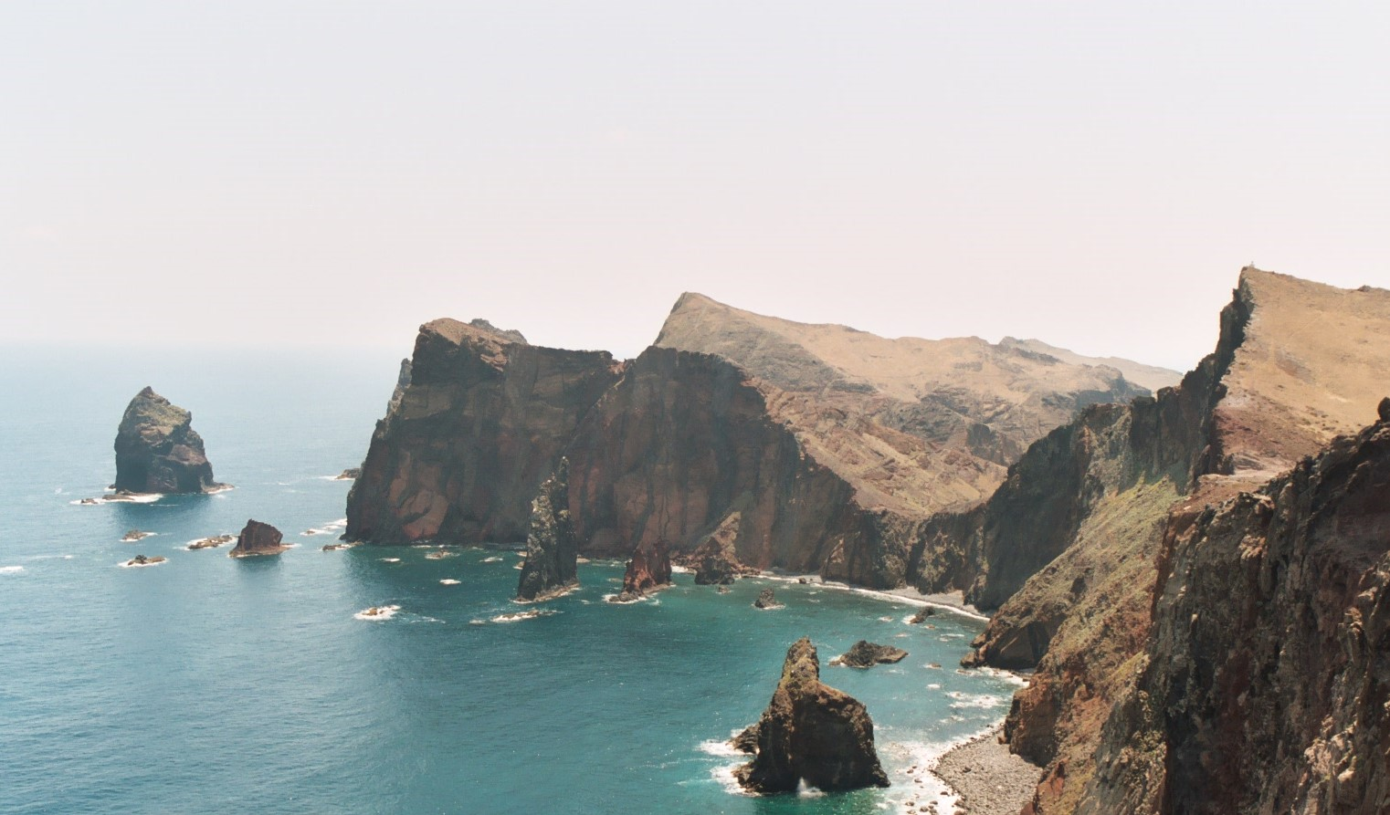 Ponta de São Lourenço